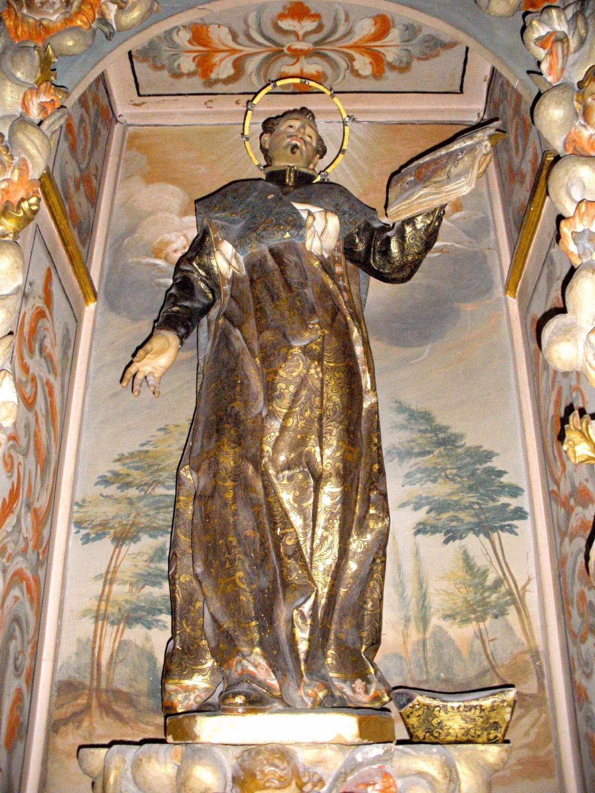 Convento de las Agustinas Recoletas (Palencia)